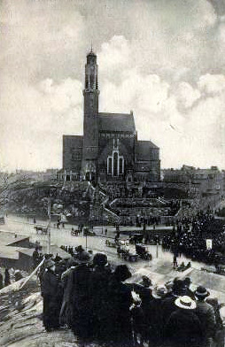 Dalkarlarna samlas vid Engelbrektskyrkan under Bondetåget 1914.